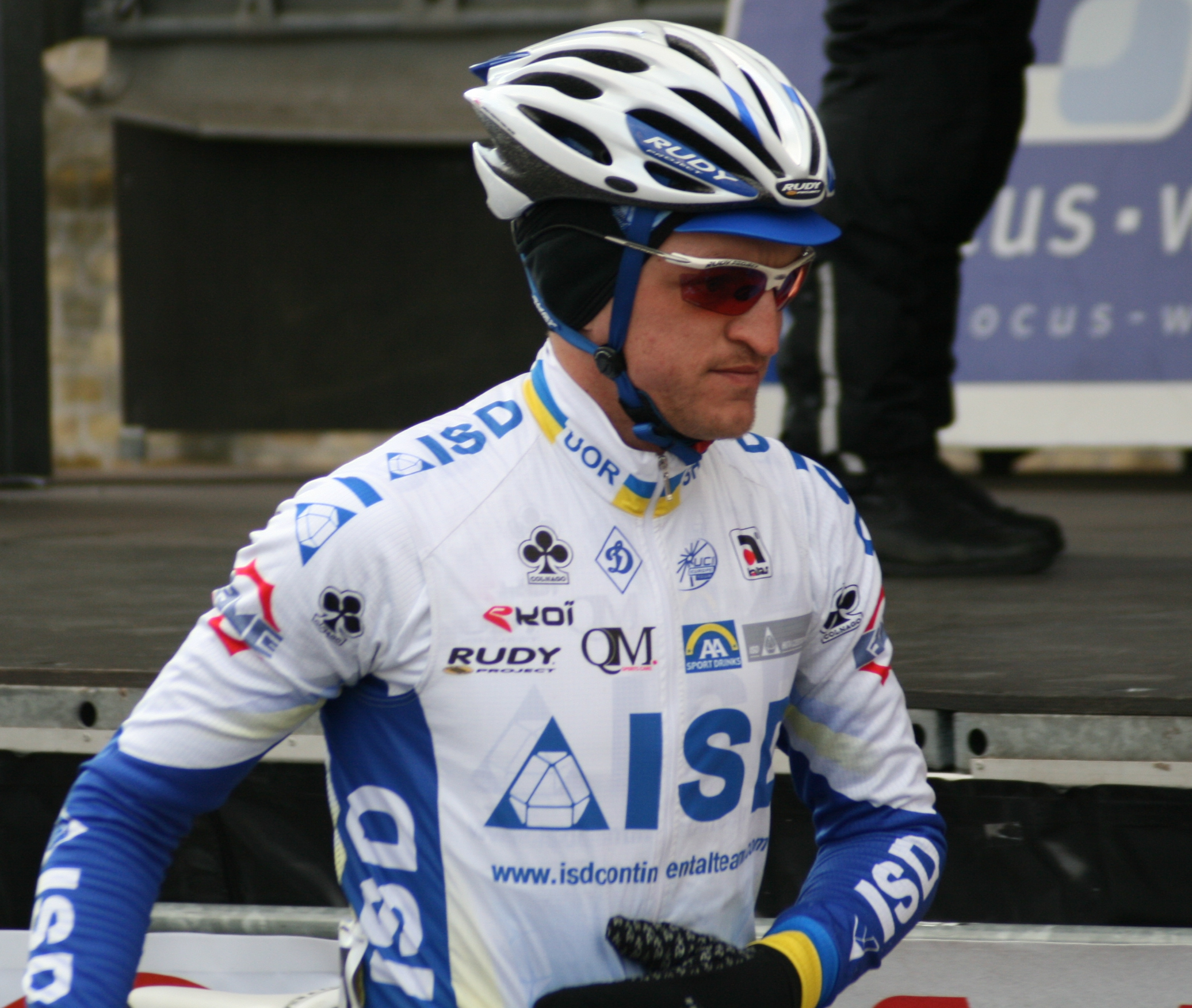 Oleksandr Sheydyk, pendant les Trois jours de Flandre occidentale 2010